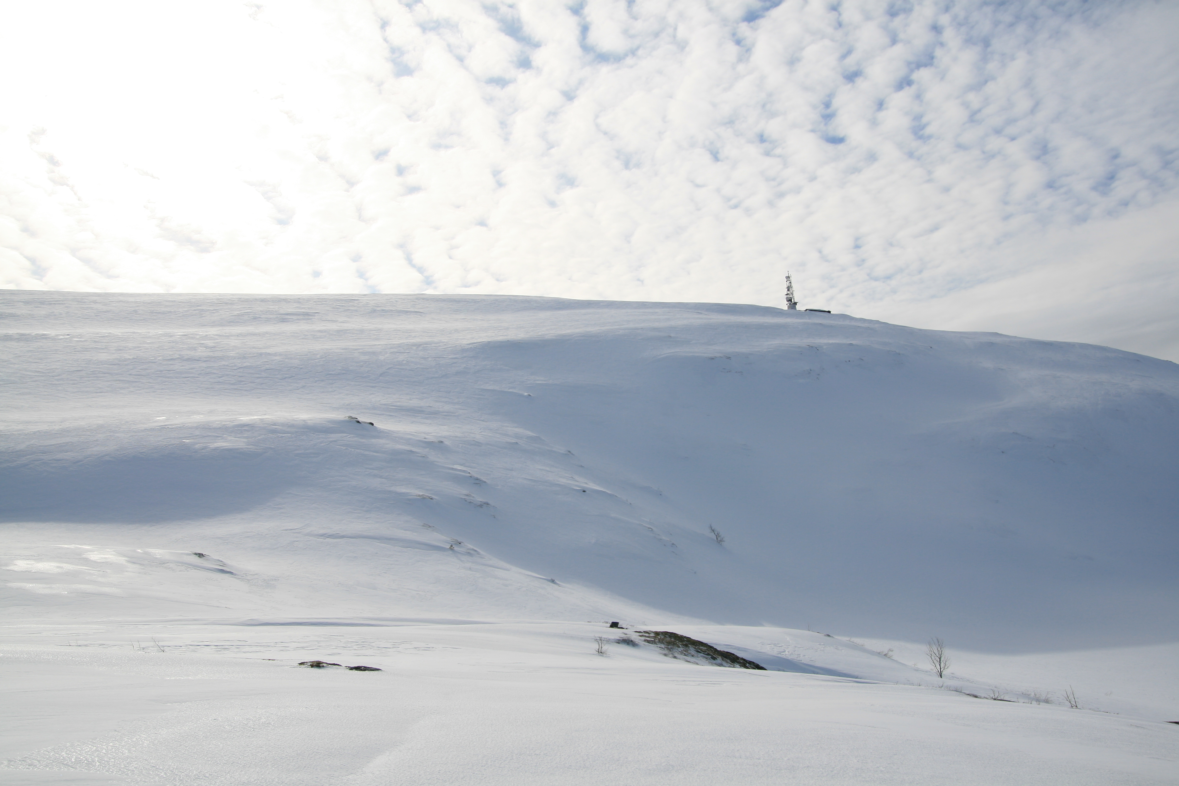 Strengen in Surnadal